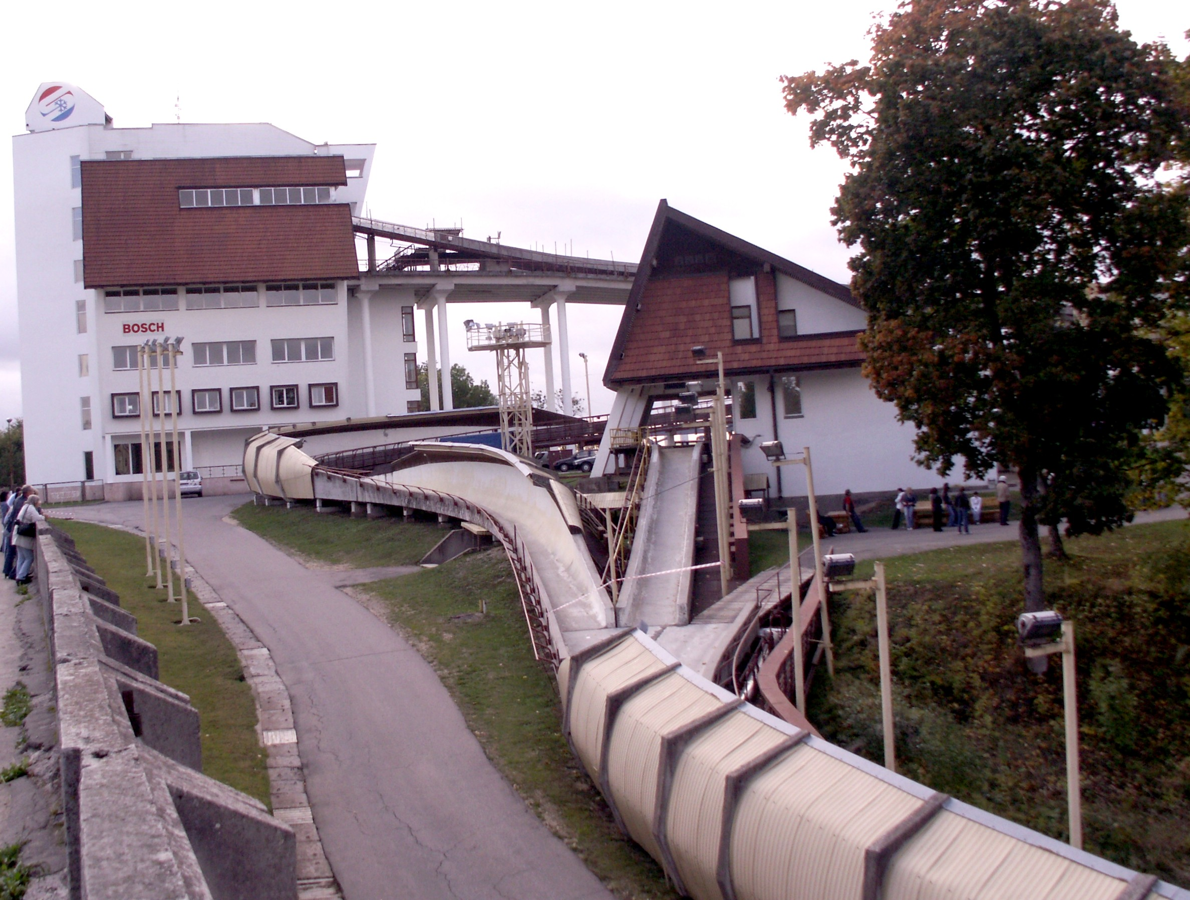 Siguldas bobsleja un kamaniņu trase